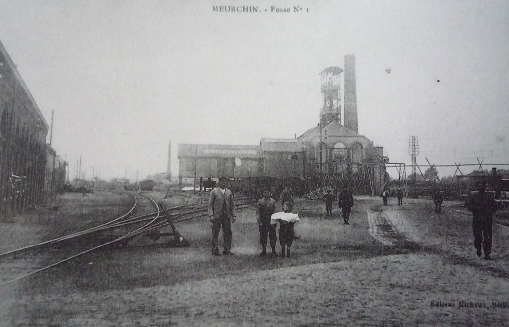 La Fosse n° 1 de la Compagnie des mines de Meurchin était un charbonnage constitué d'un seul puits situé à Bauvin, Nord, Nord-Pas-de-Calais, France.